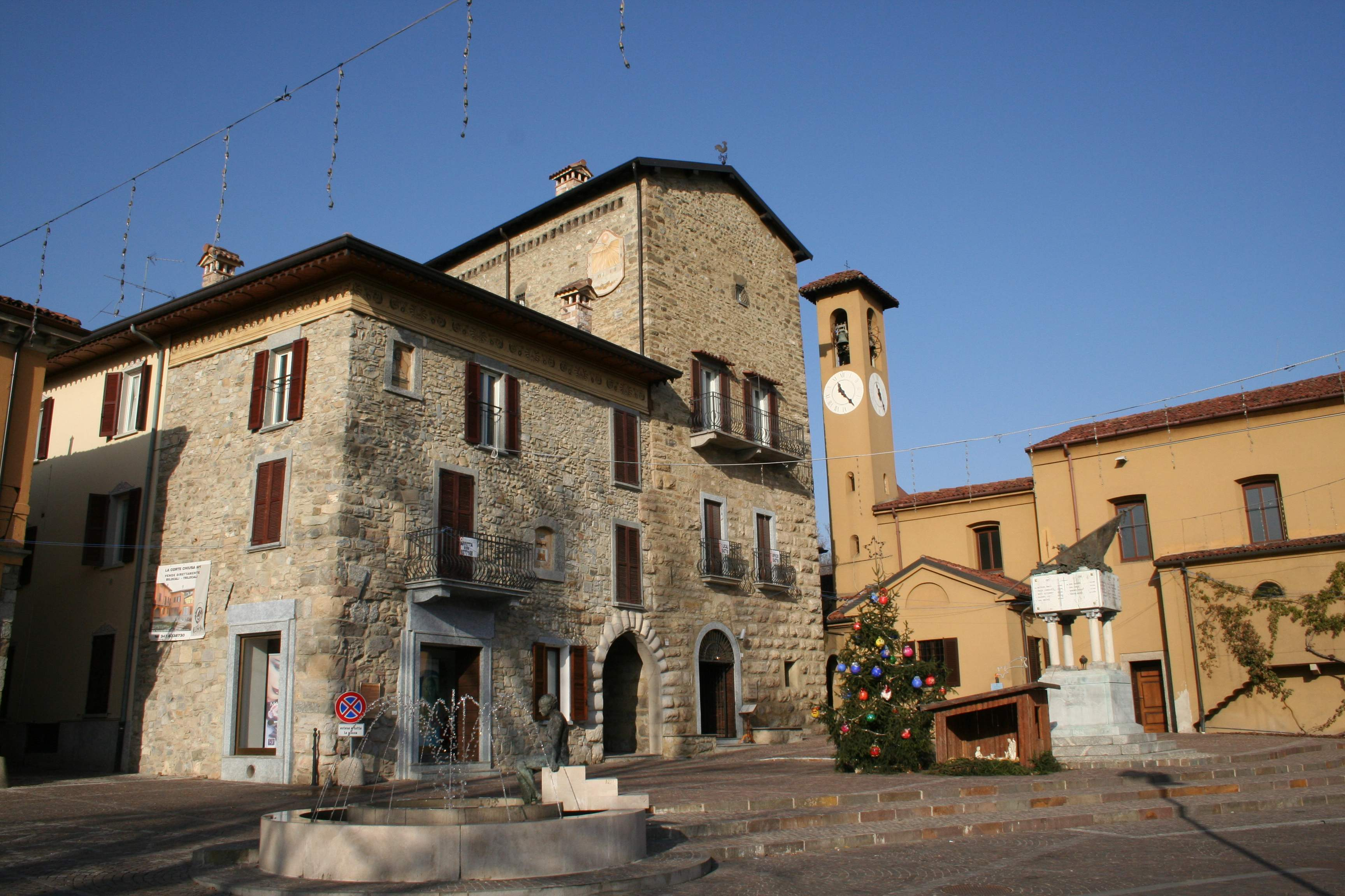 Imbersago, il centro.